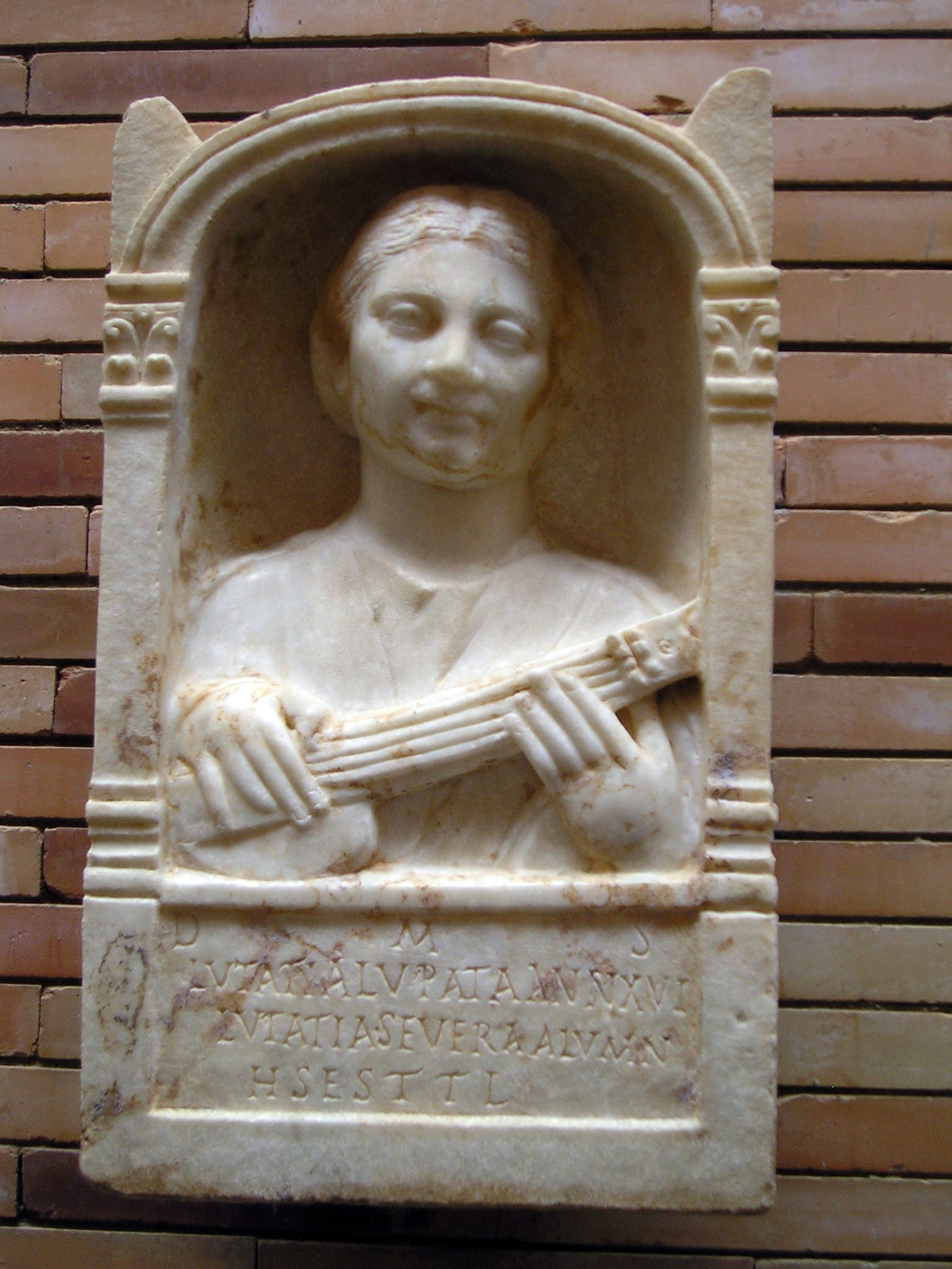 Monumento funerario romano procedente de Mérida (Badajoz, España), depositado en el Museo Nacional de Arte Romano de Mérida, correspondiente con AE 1959, 29 = AE 1962, 70: D(is) M(anibus) s(acrum)/ Lutatia Lupata ann(orum) XVI/ Lutatia Severa alumn(ae / h(ic) s(ita) e(st) s(it) t(ibi) t(erra) l(evis)